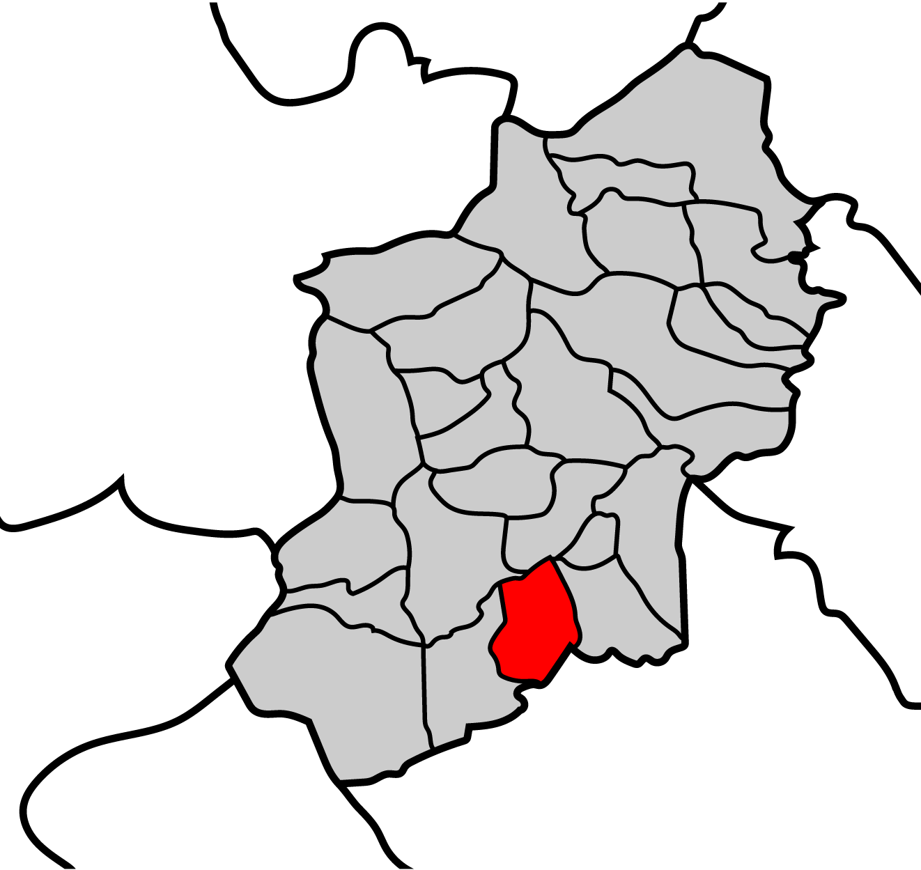 Mapa de la parroquia de Guillén ayuntamiento de Becerreá